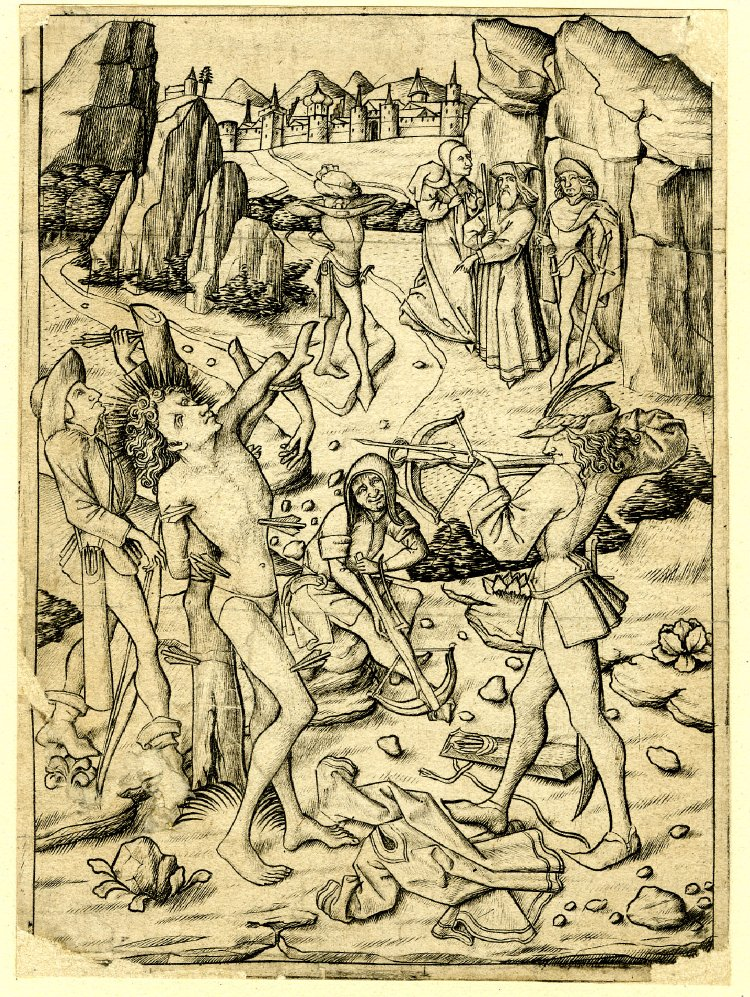 Maitre ES L.157 Martyre de Sebastien